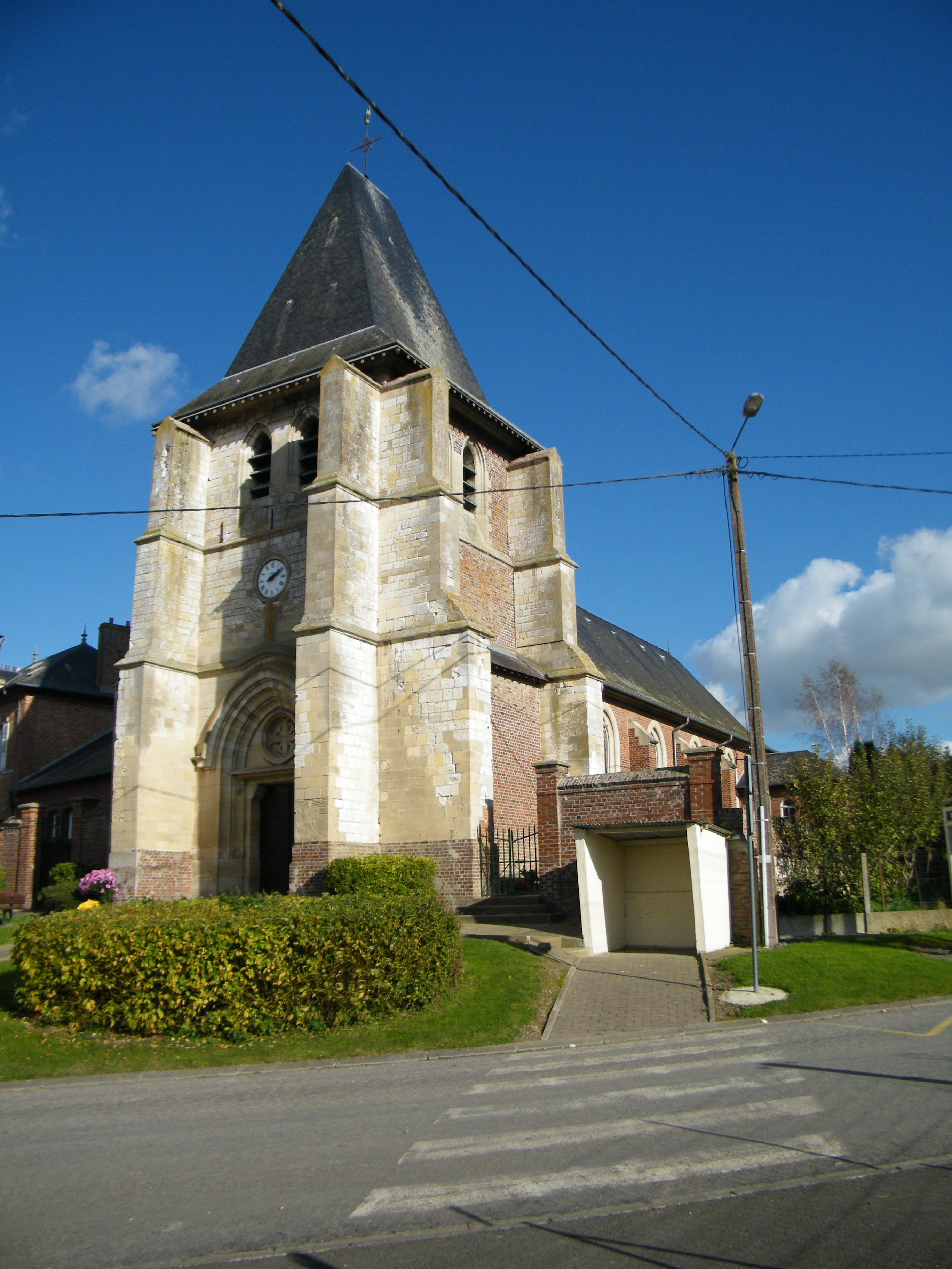 L'église.